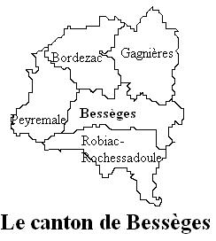 Le canton de Bessèges Image personnelle